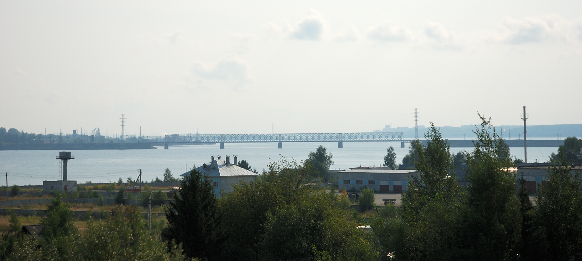 Chusovaya, Summer, 2007